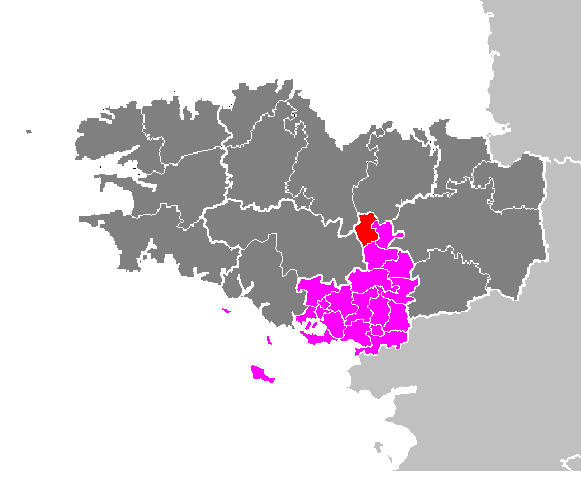 Maps of arrondissements and cantons of France: Arrondissement de Vannes - Canton de la Trinité-Porhoët.PNG